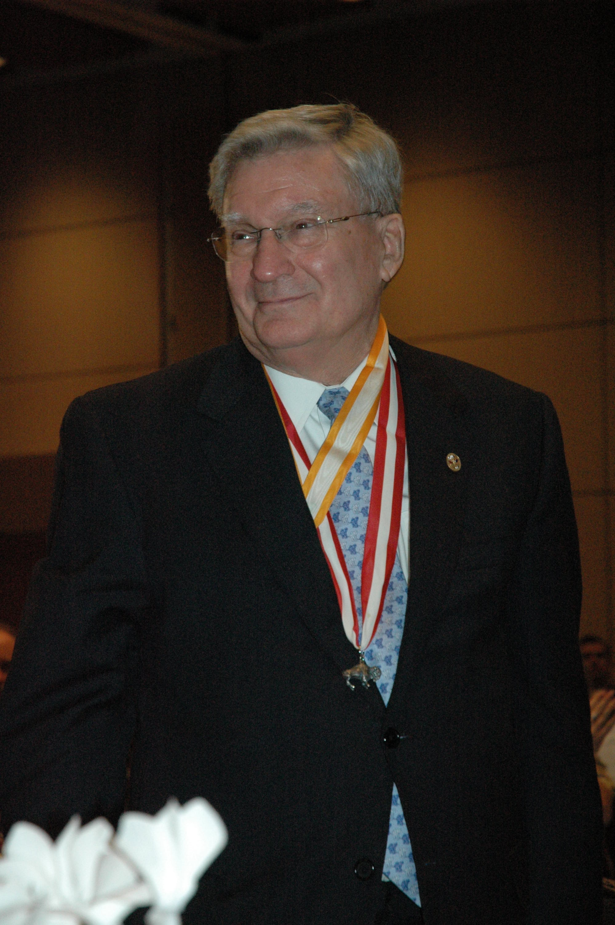 Glen McLaughlin